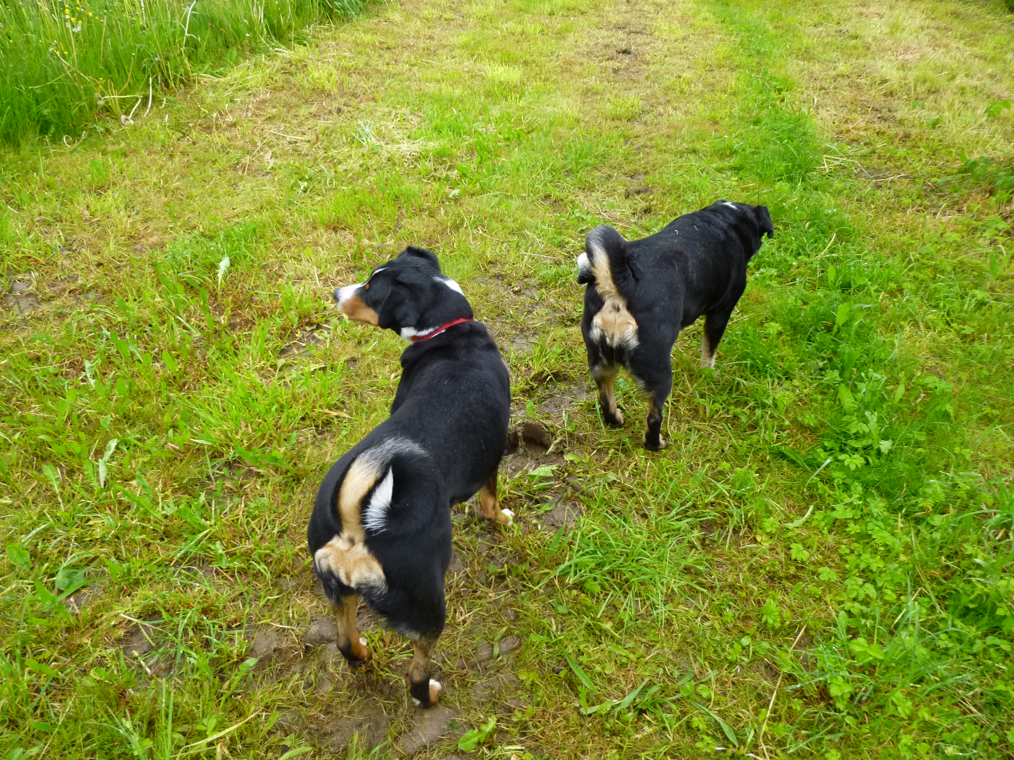 Appenzeller Sennenhündinnen